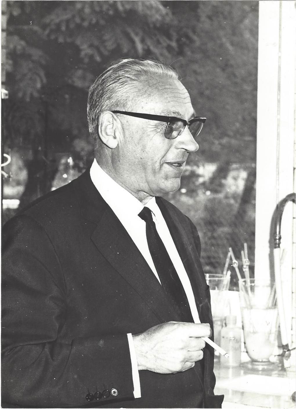 Abel Justin Brion, né le 26 juin 1906, mort le 15 juin 1976, est un vétérinaire français qui fut professeur de pathologie médicale et de législation à l’École nationale vétérinaire de Lyon, puis à celle d’Alfort